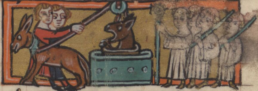 Roman de Renart enluminure de manuscrit/Medieval French manuscript